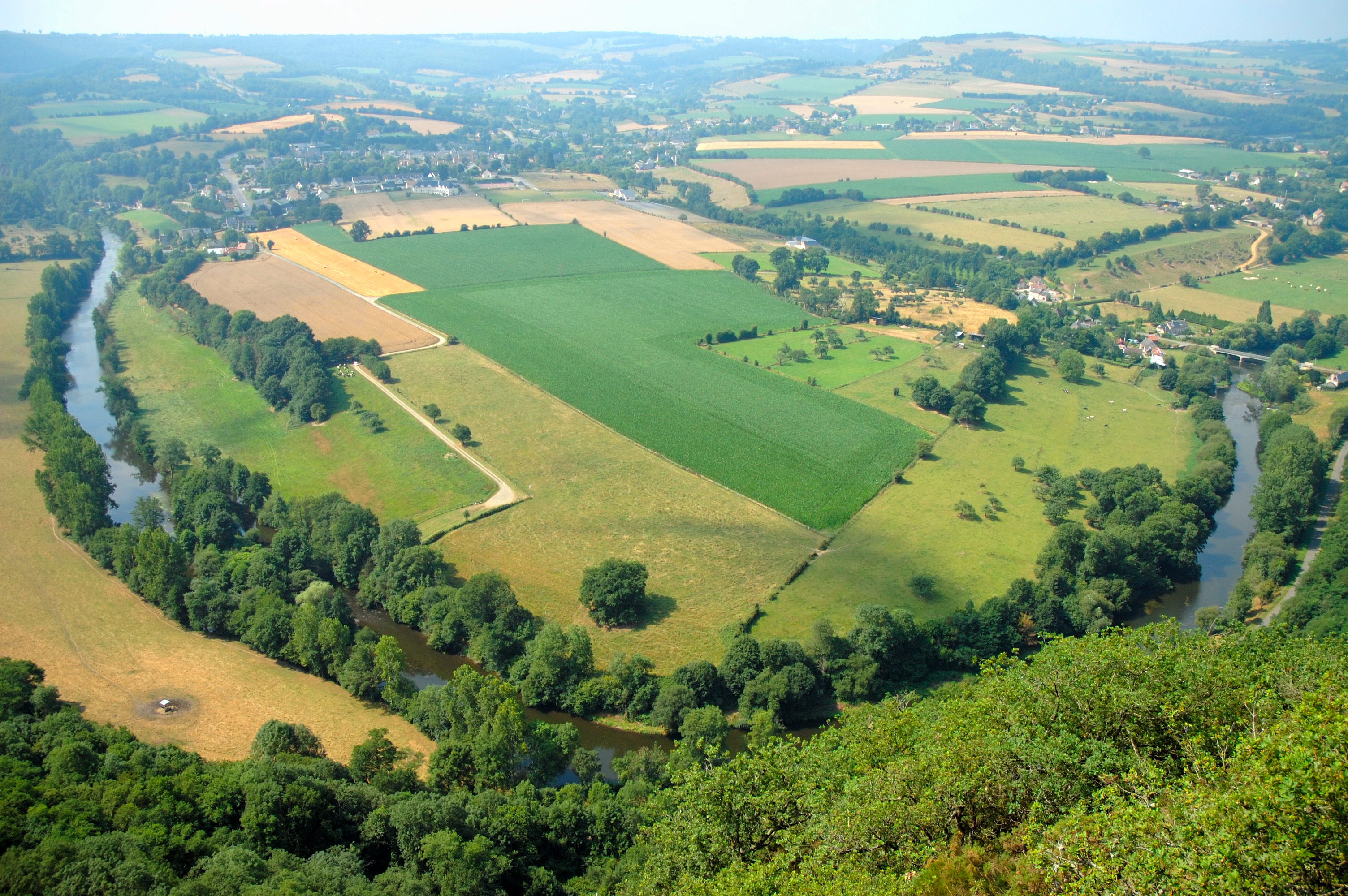 Clécy : vue panoramique depuis les rochers de la Houle à Saint-Omer